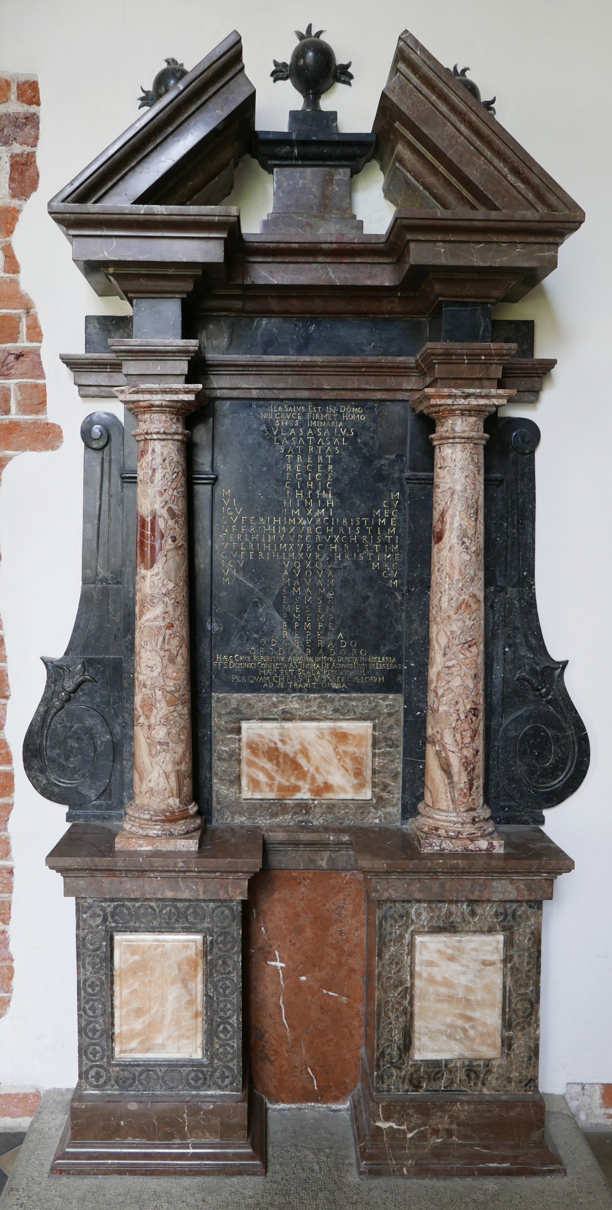 Kapliczka adoracji Krzyża św. Tomasza z Akwinu z XVII w. - krużganki przy klasztorze dominikanów w Krakowie